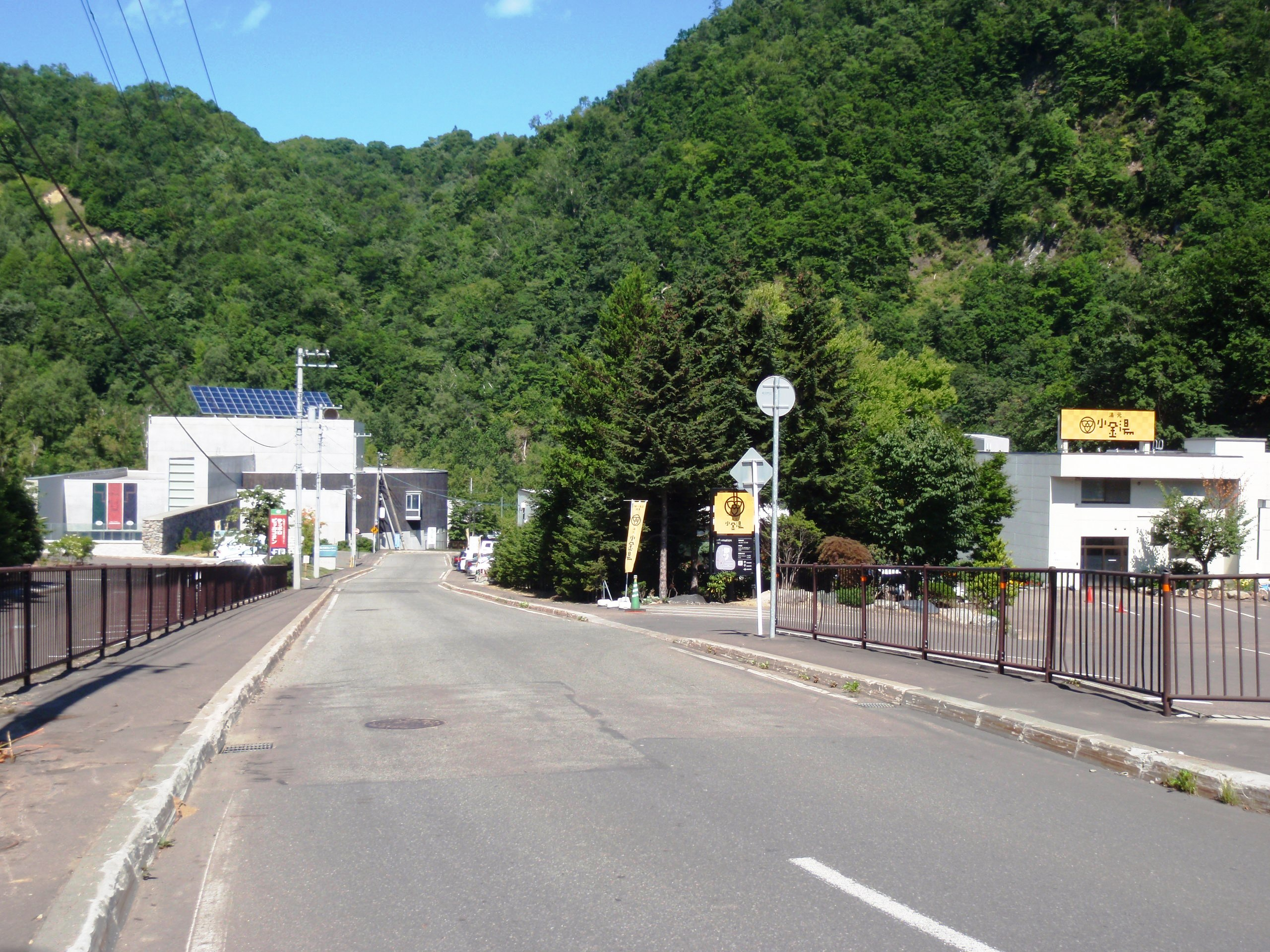 小金湯温泉街入り口、右は湯元小金湯、左はサッポロピリカコタン、道路を右に曲がった先にまつの湯がある。